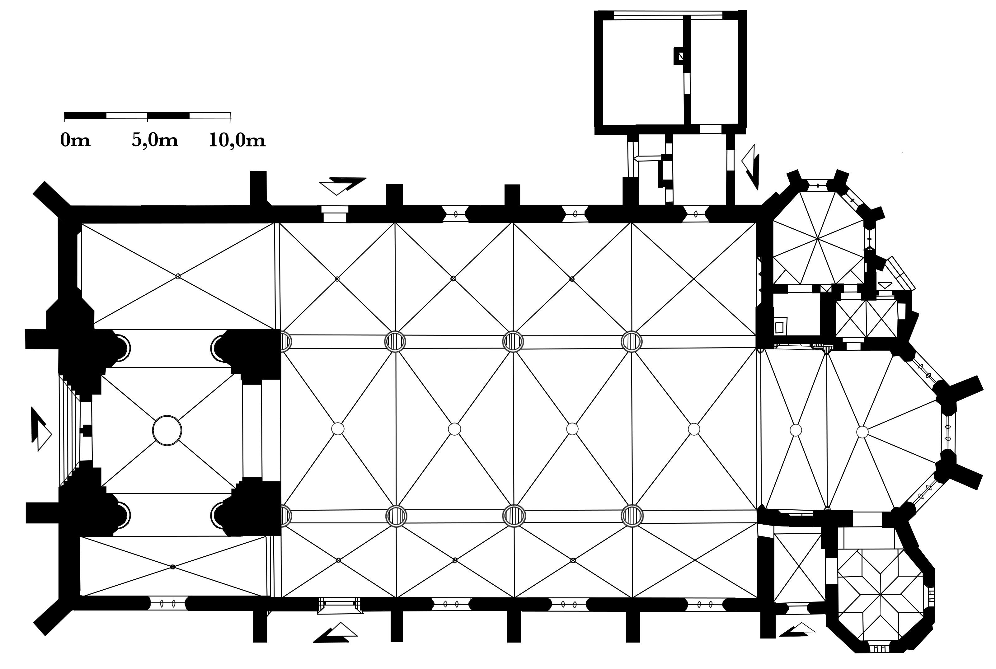 St. Dionysius Rheine, Grundriss genordet